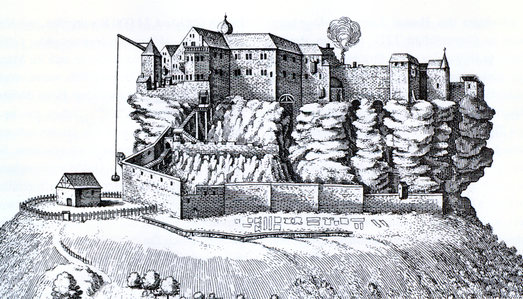 Die Dagsburg in Lothringen auf einem Kupferstich von Matthäus Merian um 1663